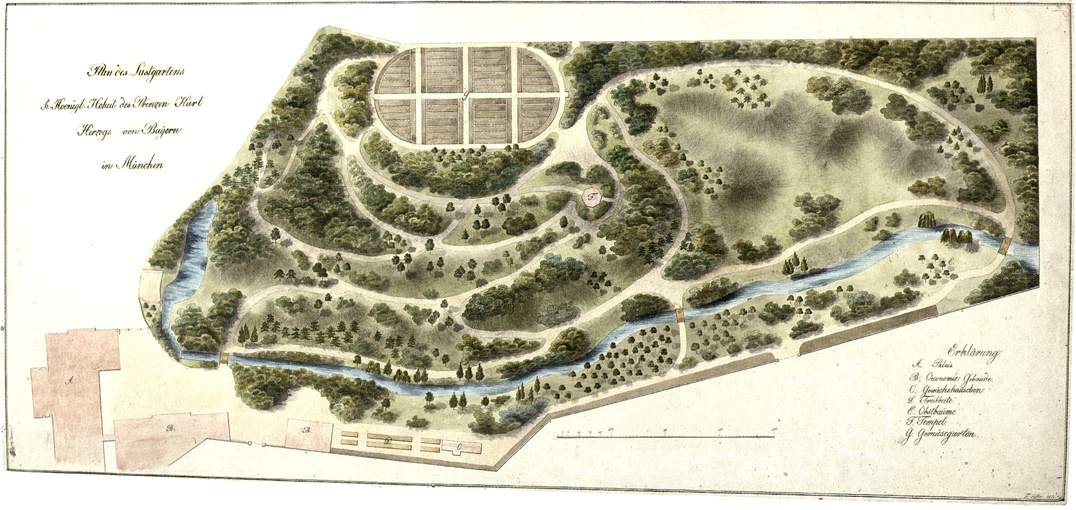 Plan des "Lustgartens des Prinzen Karl von Bayern" in München, F. Hiller, 1837